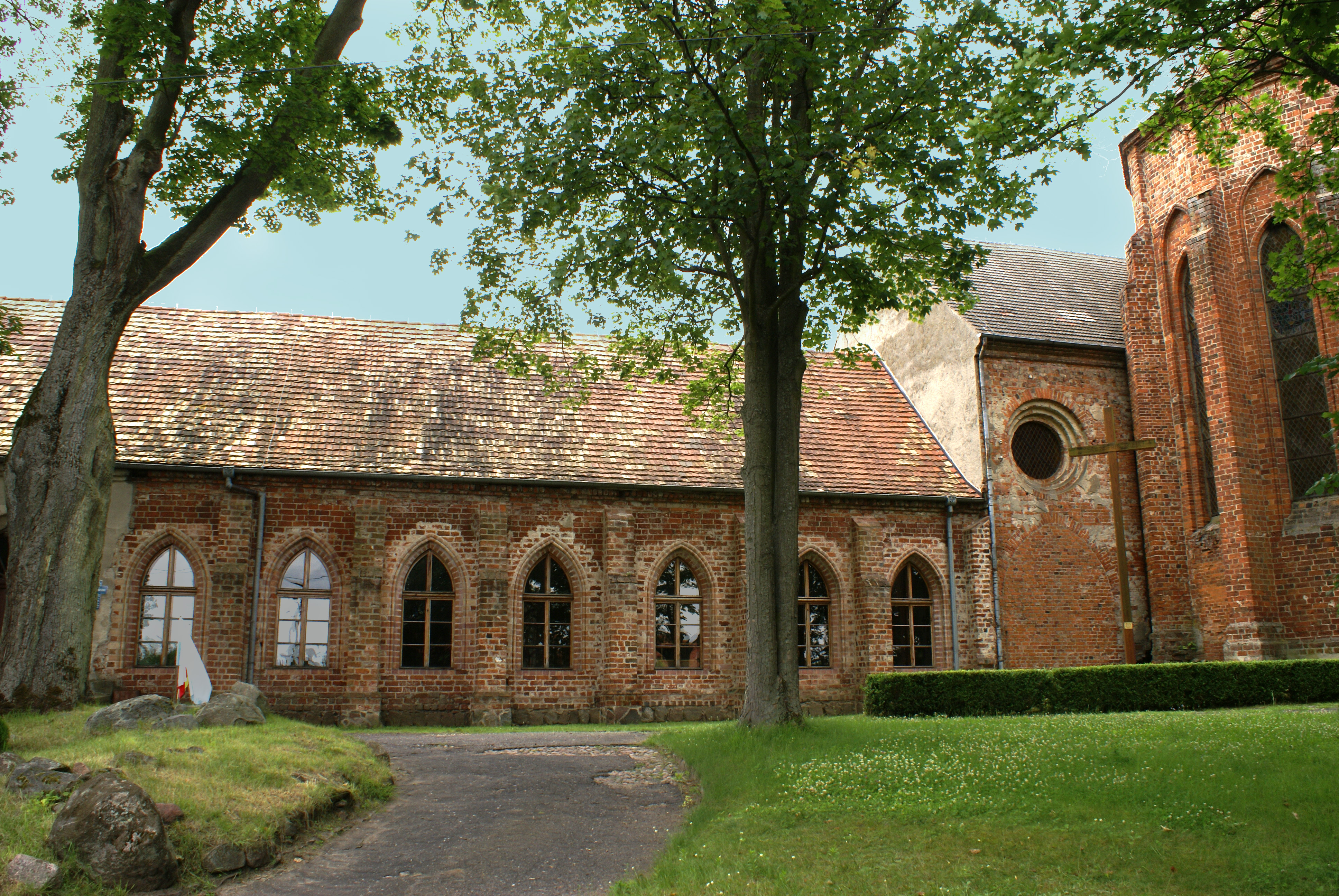 Bierzwnik - klasztor pocysterski (zabytek nr rejestr. 413/92*)